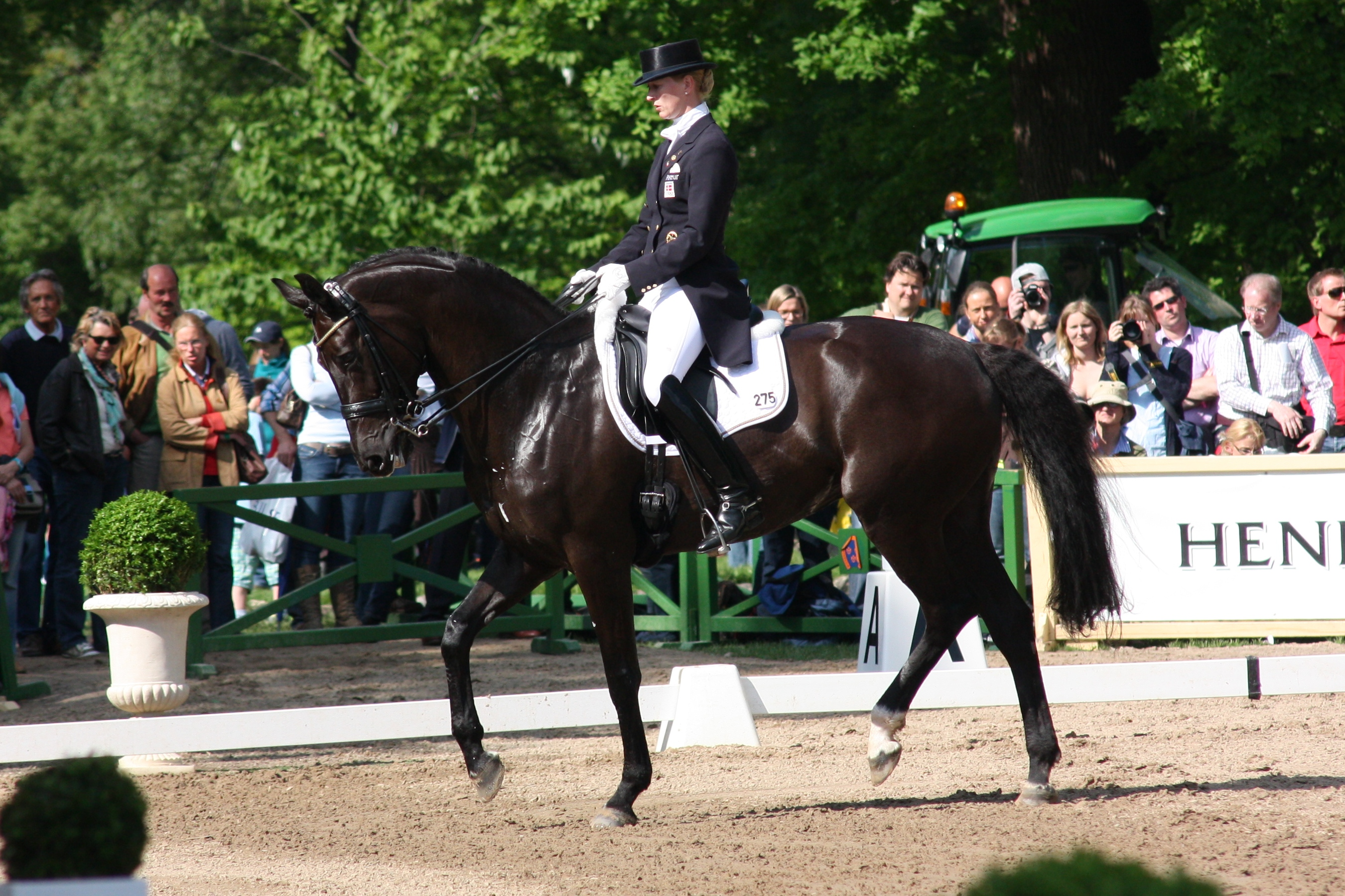 77. Internationales Pfingstturnier Wiesbaden 2013, CDI **** Dressurprüfung Grand Prix de Dressage, Sayn-Wittgenstein,Nathalie zu mit Fabienne Personality rights warning Although this work is freely licensed or in the public domain, the person(s) shown may have rights that legally restrict certain re-uses unless those depicted consent to such uses. In these cases, a model release or other evidence of consent could protect you from infringement claims.